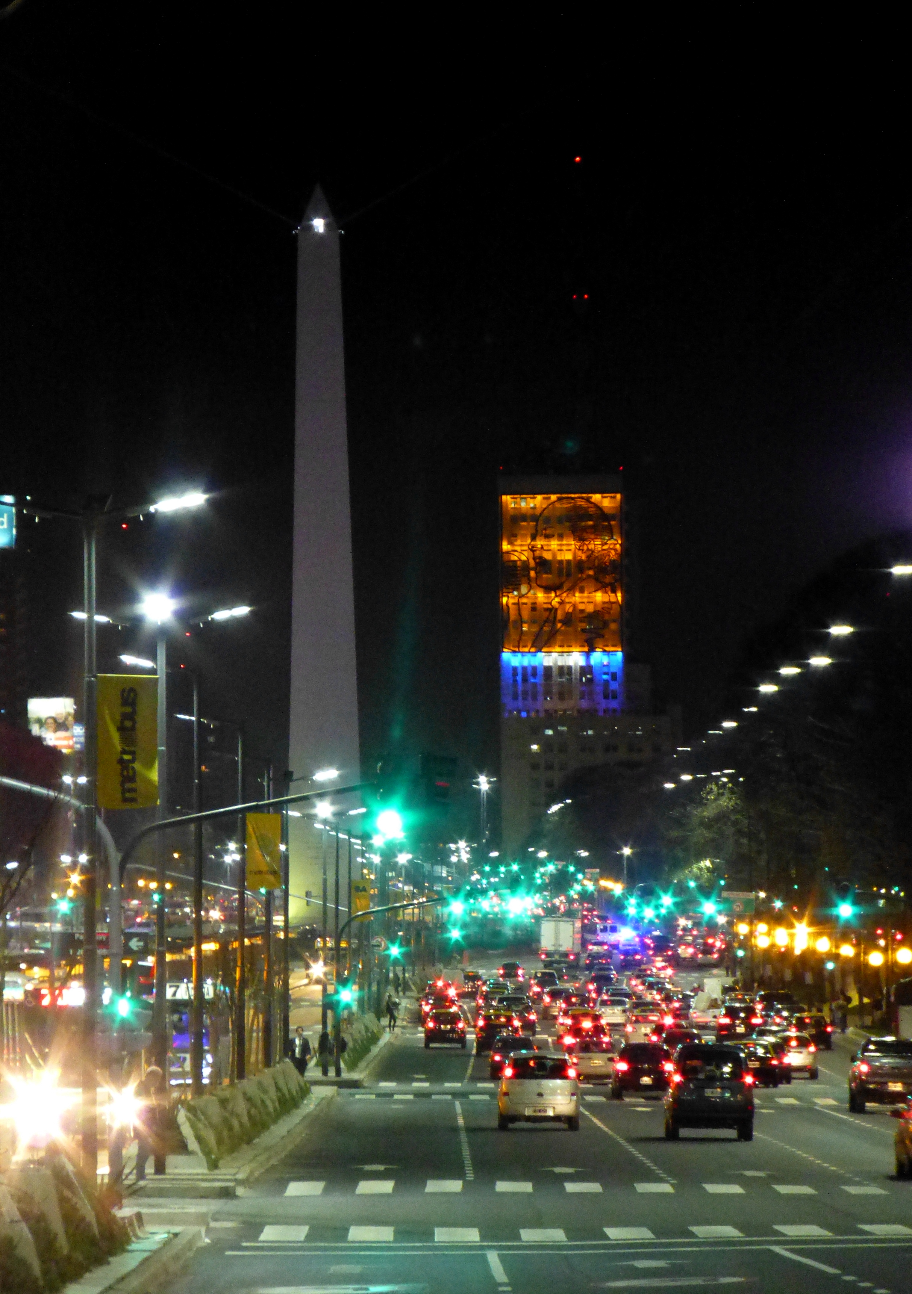 La avenida 9 de Julio por la noche, iluminada. Al fondo se ve el Obelisco, el retrato de Evita sobre el Edificio del Ministerio de Obras Públicas y los carrilles exclusivos de colectivos, devenidos en "Metrobús".